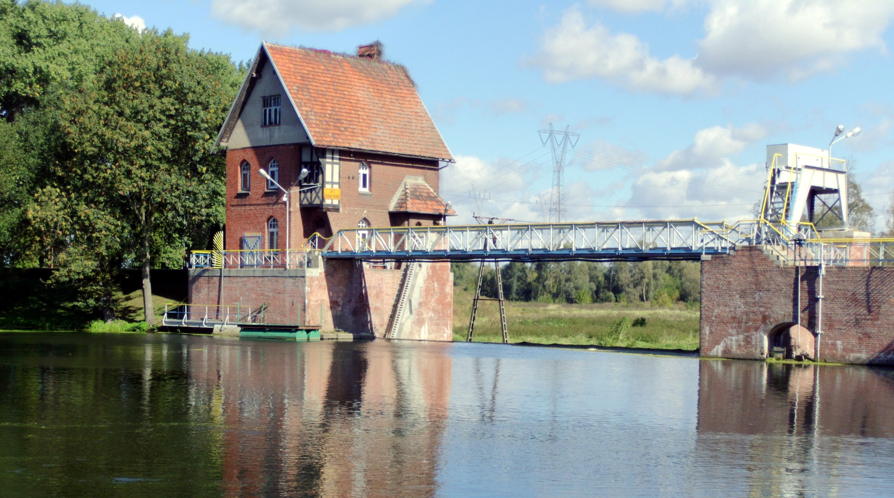 zespół Kanału Bydgoskiego (Starego i Nowego), 1773-1774, 1908-1815: szlak wodny z urządzeniami hydrotechnicznymi (9 śluz, 1 jaz) 6 budynków maszynowni 2 budynki sterowni 3 budynki obsługi 5 budynków mieszkalnych („dom śluzowego”) Bydgoszcz - Kanał Bydgoski (zabytek nr rejestr. A/900/1-27)